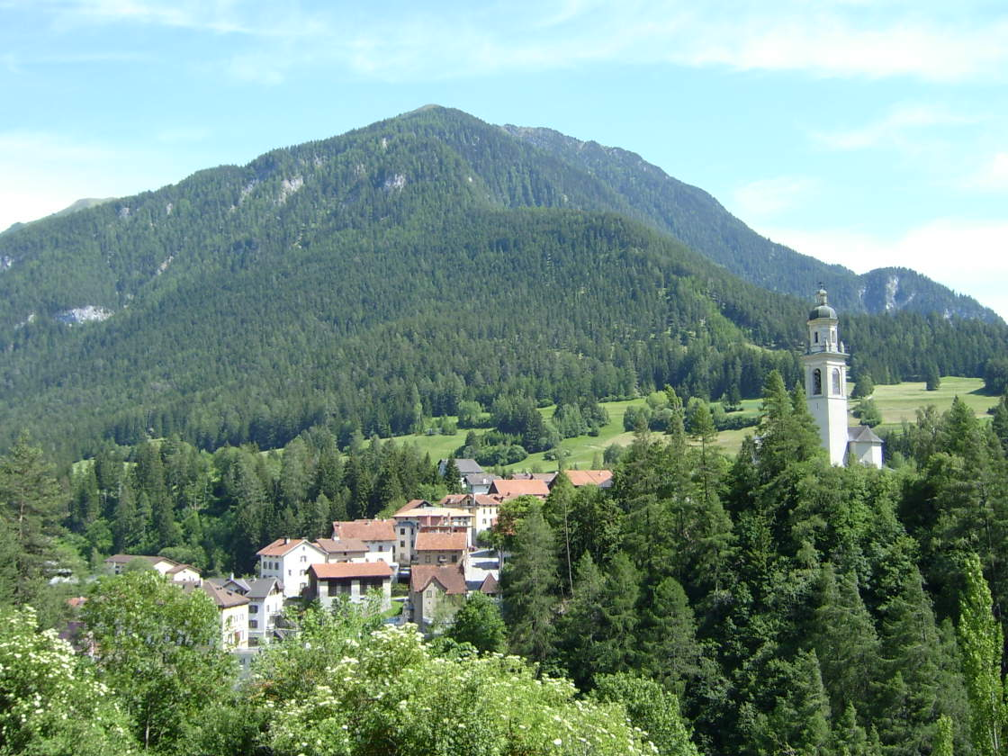 Tiefencastel, Sicht von WestenRumantsch: Casti, vista digl vest